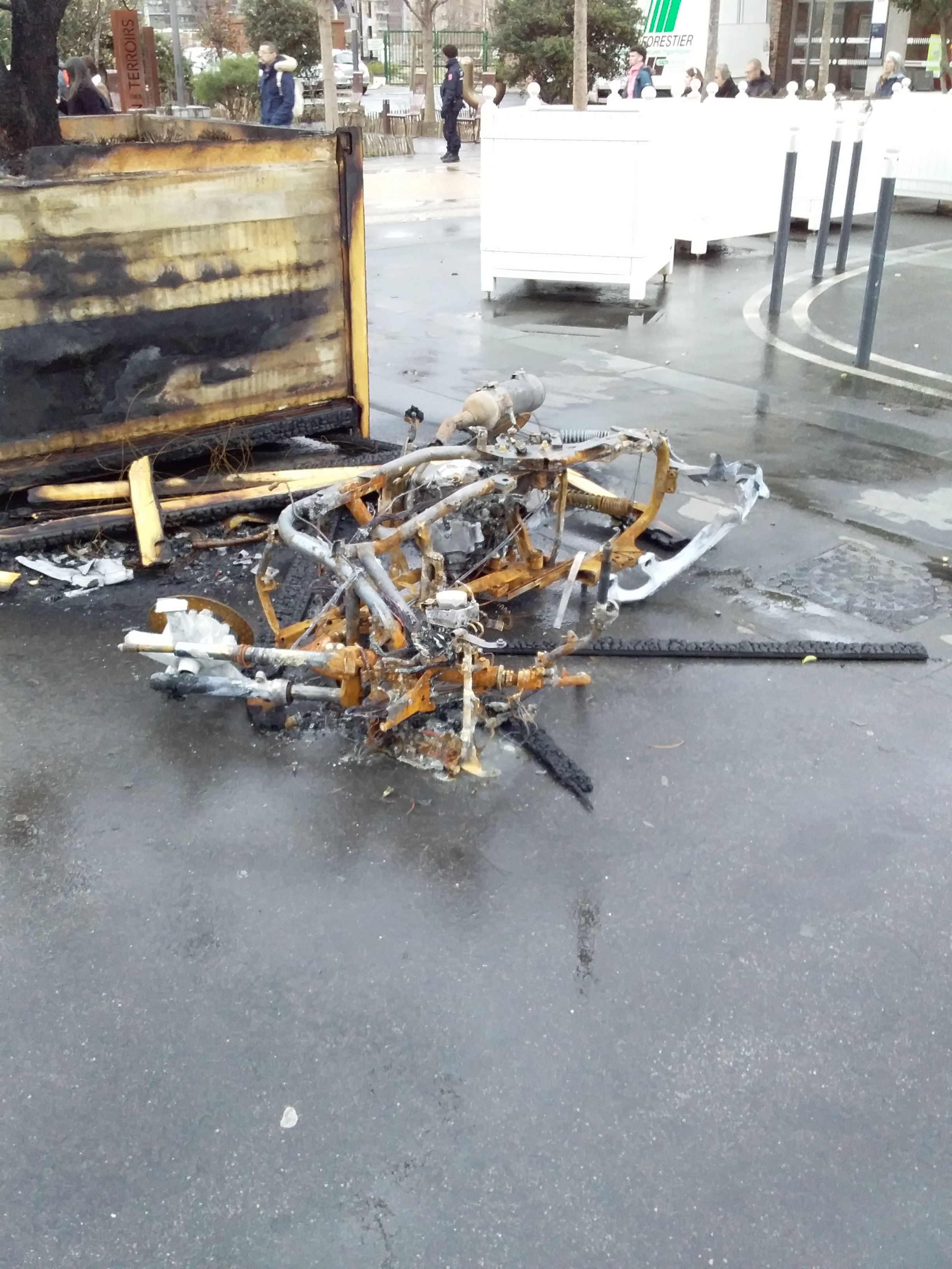 Moto brûlée devant la gare de Paris Bercy, après le concert de Fally Ipupa le 28 février